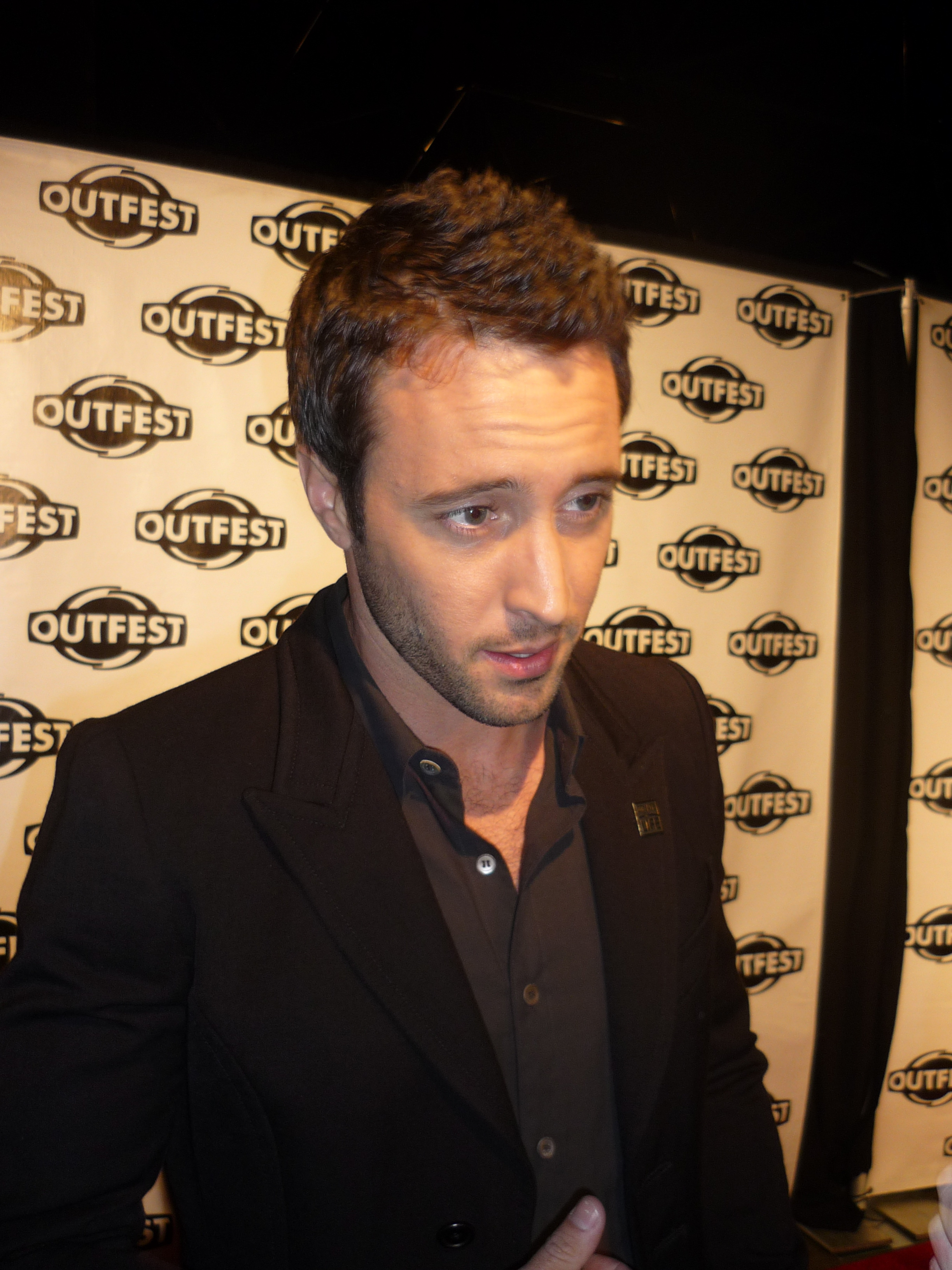 Alex O'Loughlin @ 2009 Outfest Legacy Awards